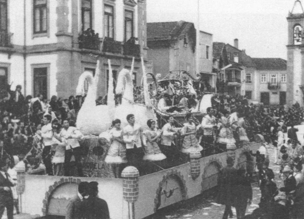 Desfile de Carnaval em Ovar, nos anos 60.